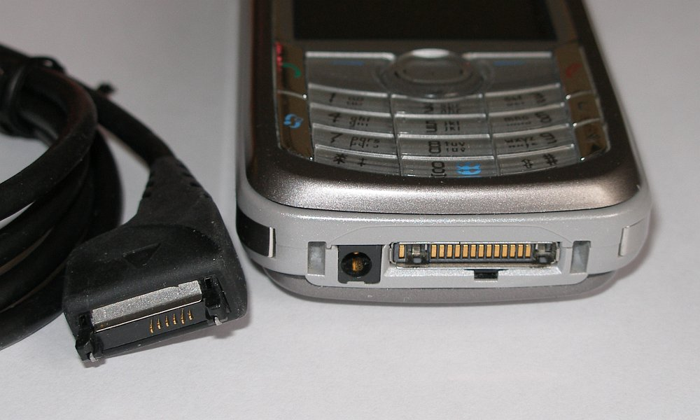 Nokia Pop-Port + passendes Anschlusskabel